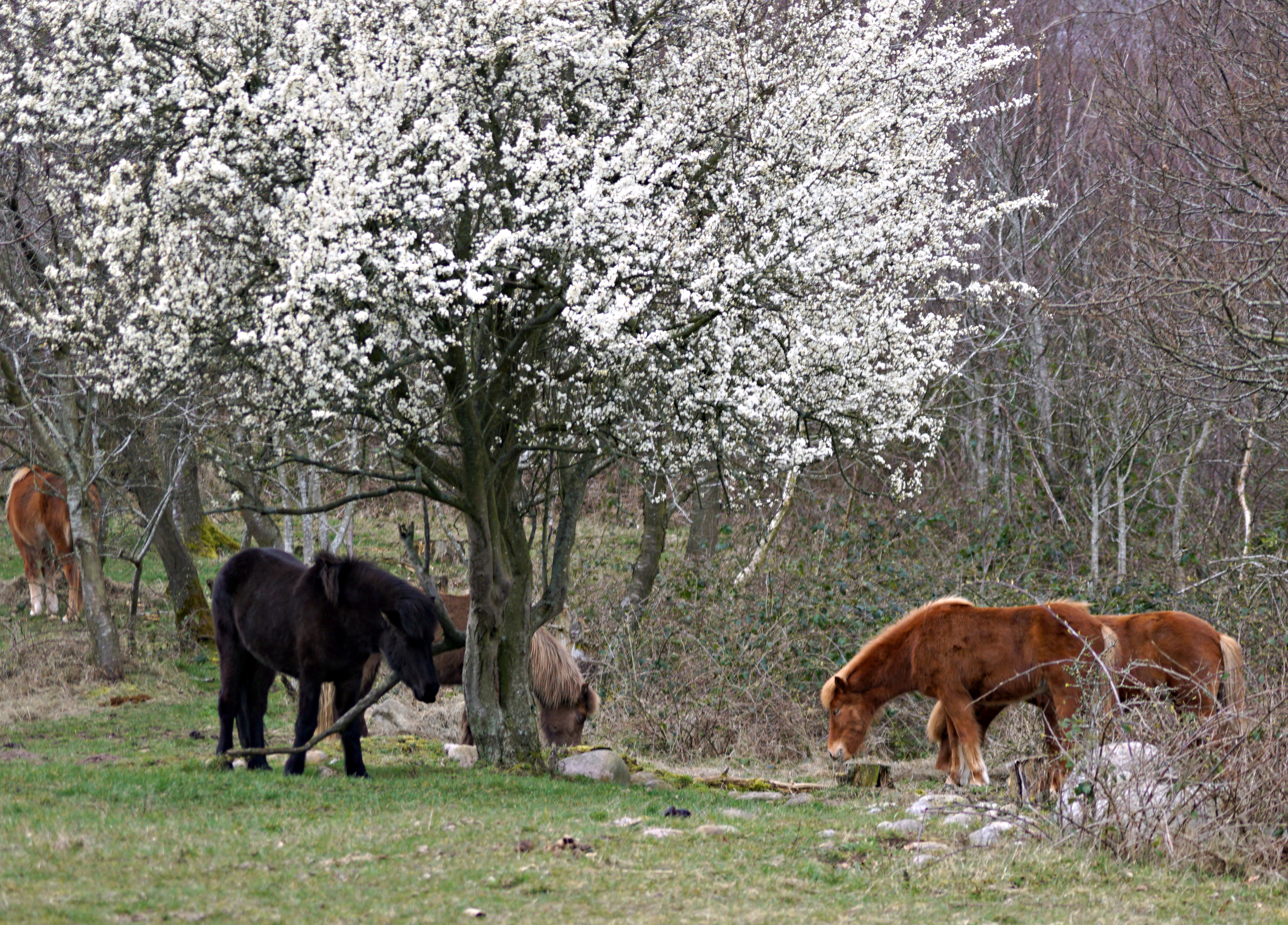 Exmoor-ponyer øst for Agri Baunhøj i Nationalpark Mols Bjerge 18. marts 2020